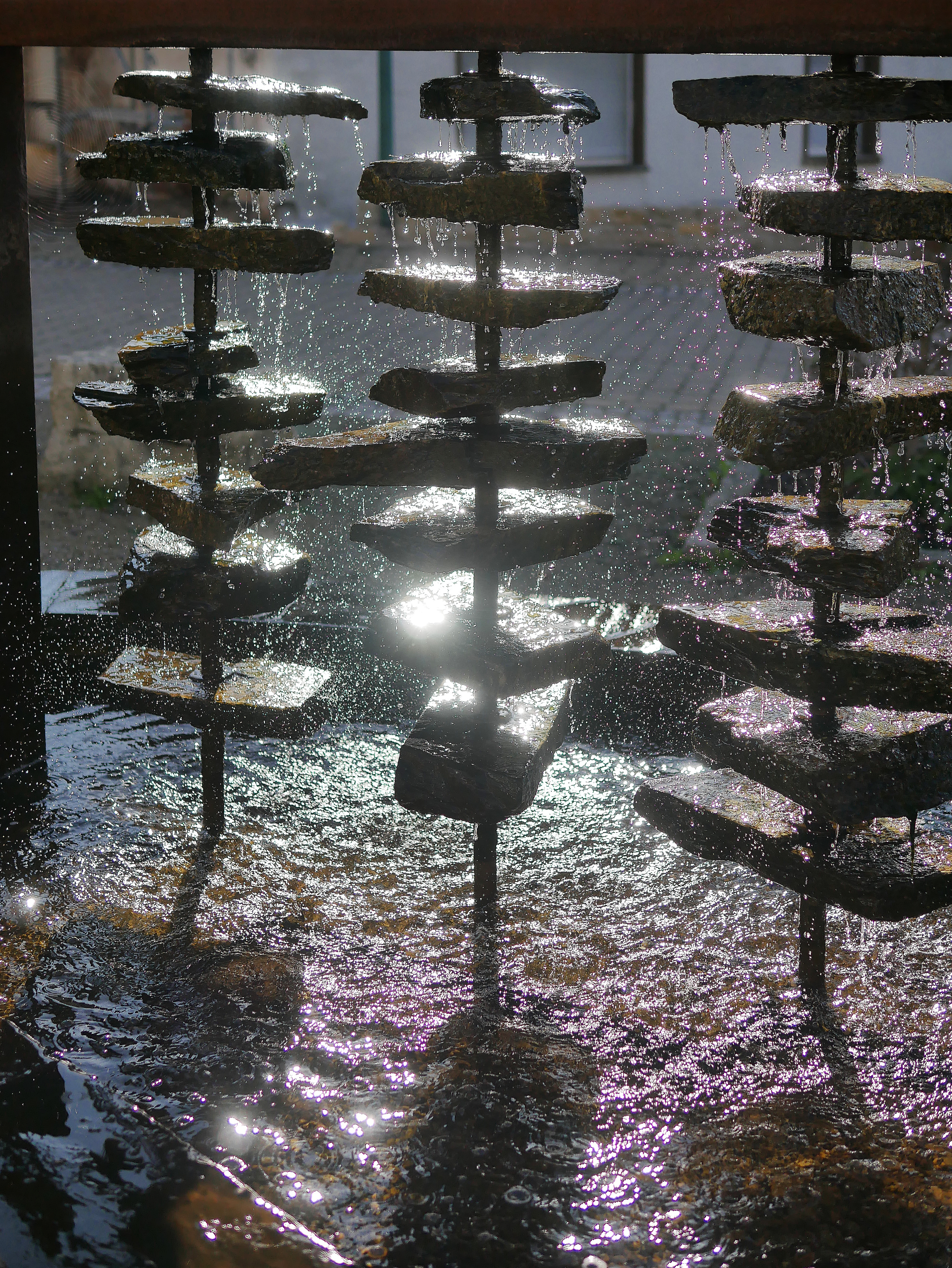 "Esoterikbrunnen" in Konz-Oberemmel am Maximinerplatz